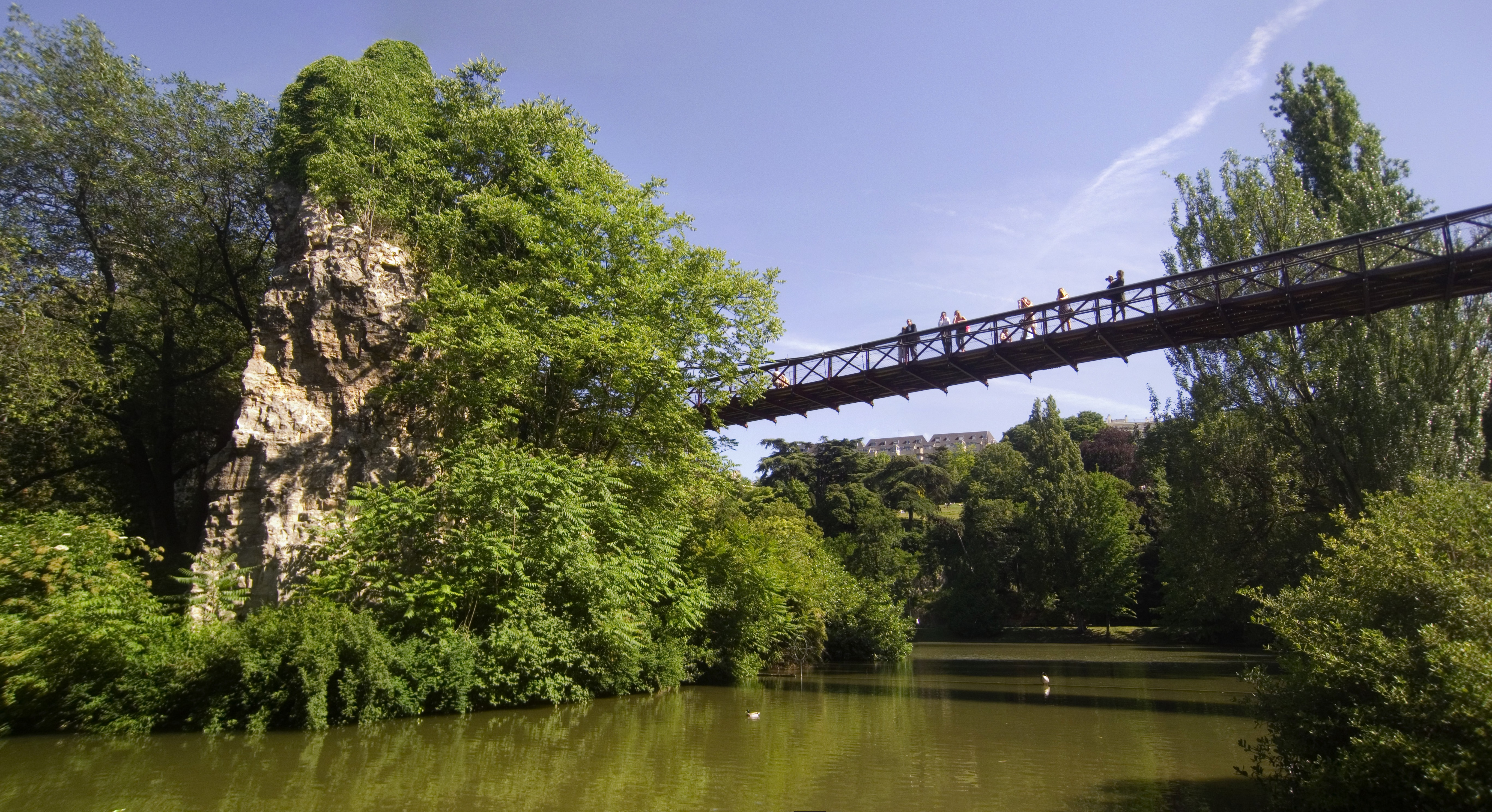 Une photo pour expliquer simplement le dénivelé des Buttes-Chaumont : le lac est la partie la plus basse. Les immeubles au fond sont au niveau de la partie la plus haute. C'est pentu.